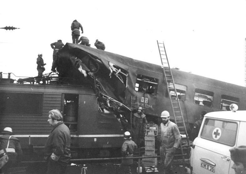 ADN-ZB Grubitzsch (Raphael)-29.2.1984-frs-Halle: Schweres Zugunglück-Ein folgenschweres Zugunglück ereignete sich auf dem Bahnhof Hohenthurm in der Nähe von Halle. Bei dichtem Nebel fuhr der D354 Berlin-Saarbrücken auf einen haltenden Personenzug auf, an dem eine Lokomotive gekoppelt war. Dabei kamen nach bisherigen Informationen der Lokführer sowie zwei Reisende des Personenzuges ums Leben. - Weiteres siehe ADN-Meldg.